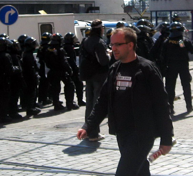 Miroslav Mareš při spolupráci s Policií České republiky na demonstraci Národního odporu na 1. máje 2007 v Brně